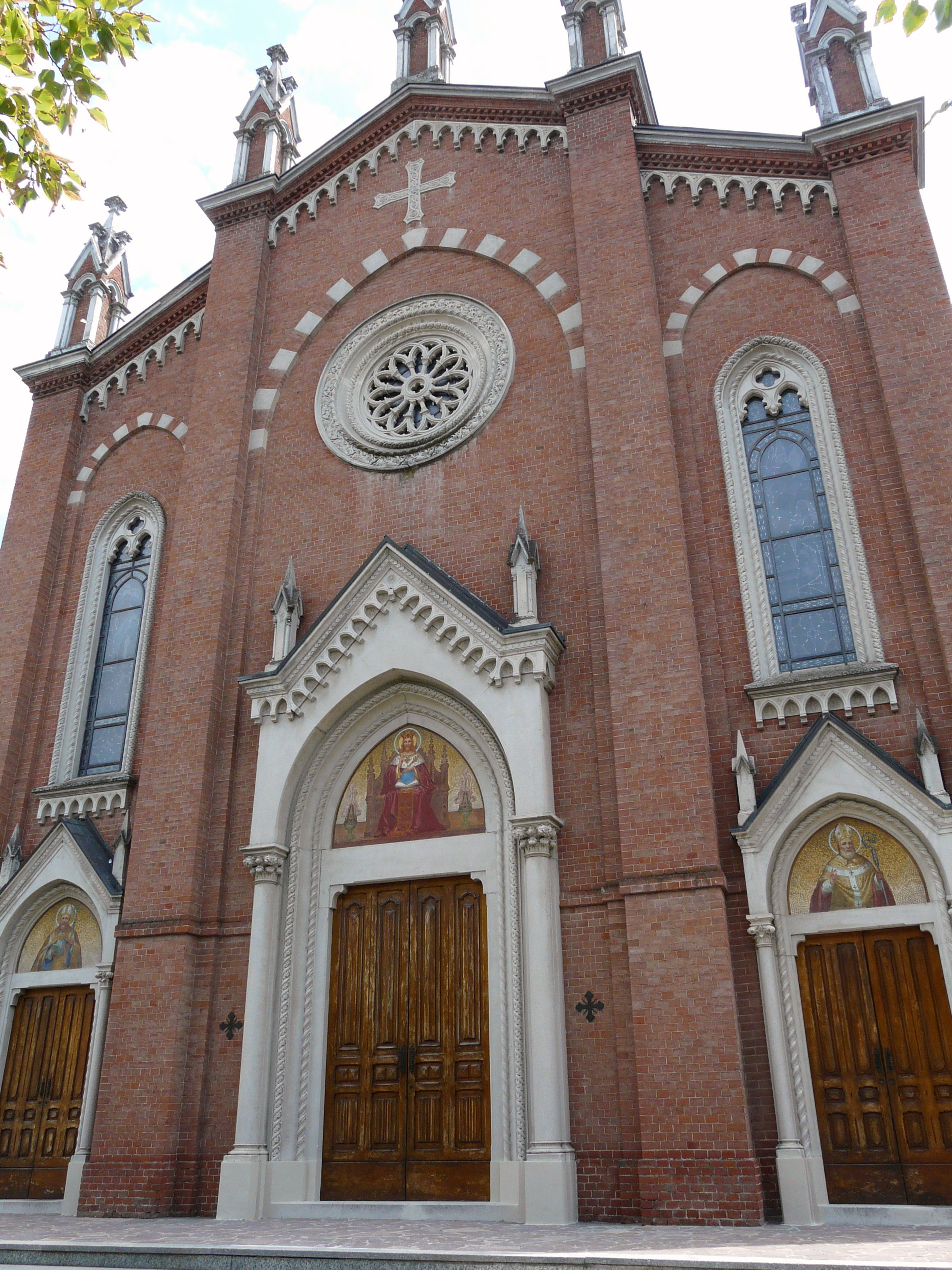 Chiesa di San Siro, Goadiasco, Lombardia, Italia